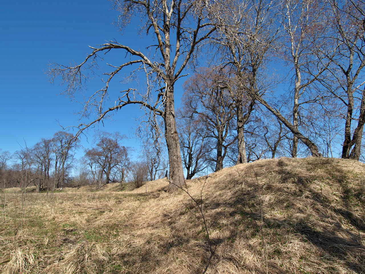 Городище: близ деревни, на правом берегу р. Сумма, Кайболово, Кингисеппский район, Ленинградская область